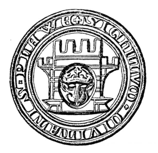 Siegel der Stadt Plau 1354 (Holzstich von 1852)